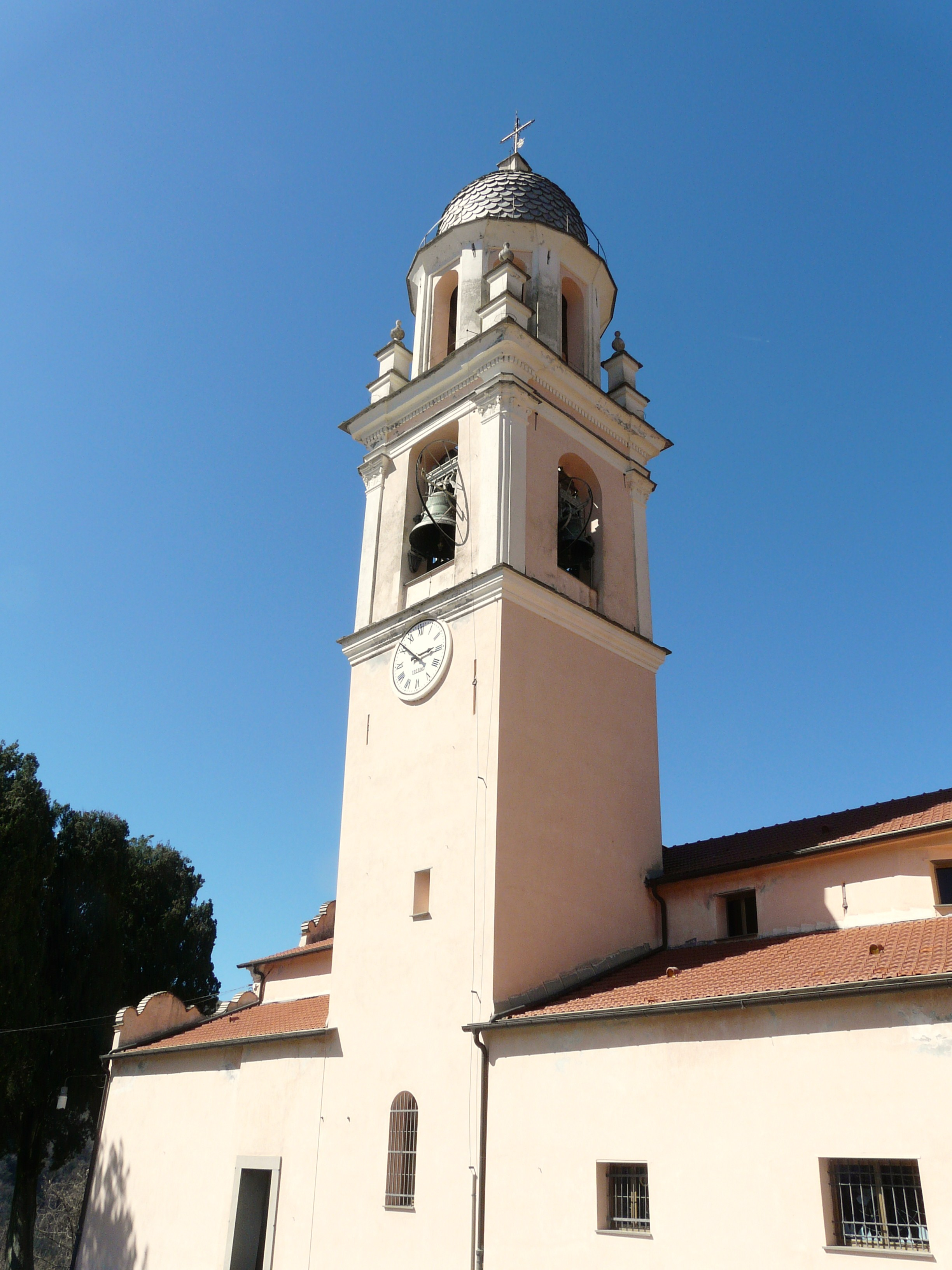 Pieve di Santa Maria Assunta di Bargagli, Liguria, Italia